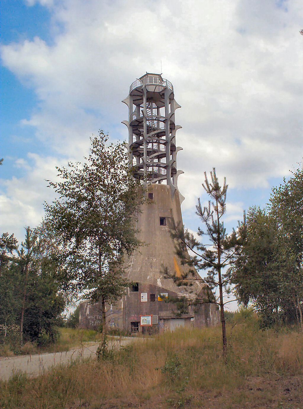 Wieża dowodzenia Baterii Goeben k. Świnoujscia